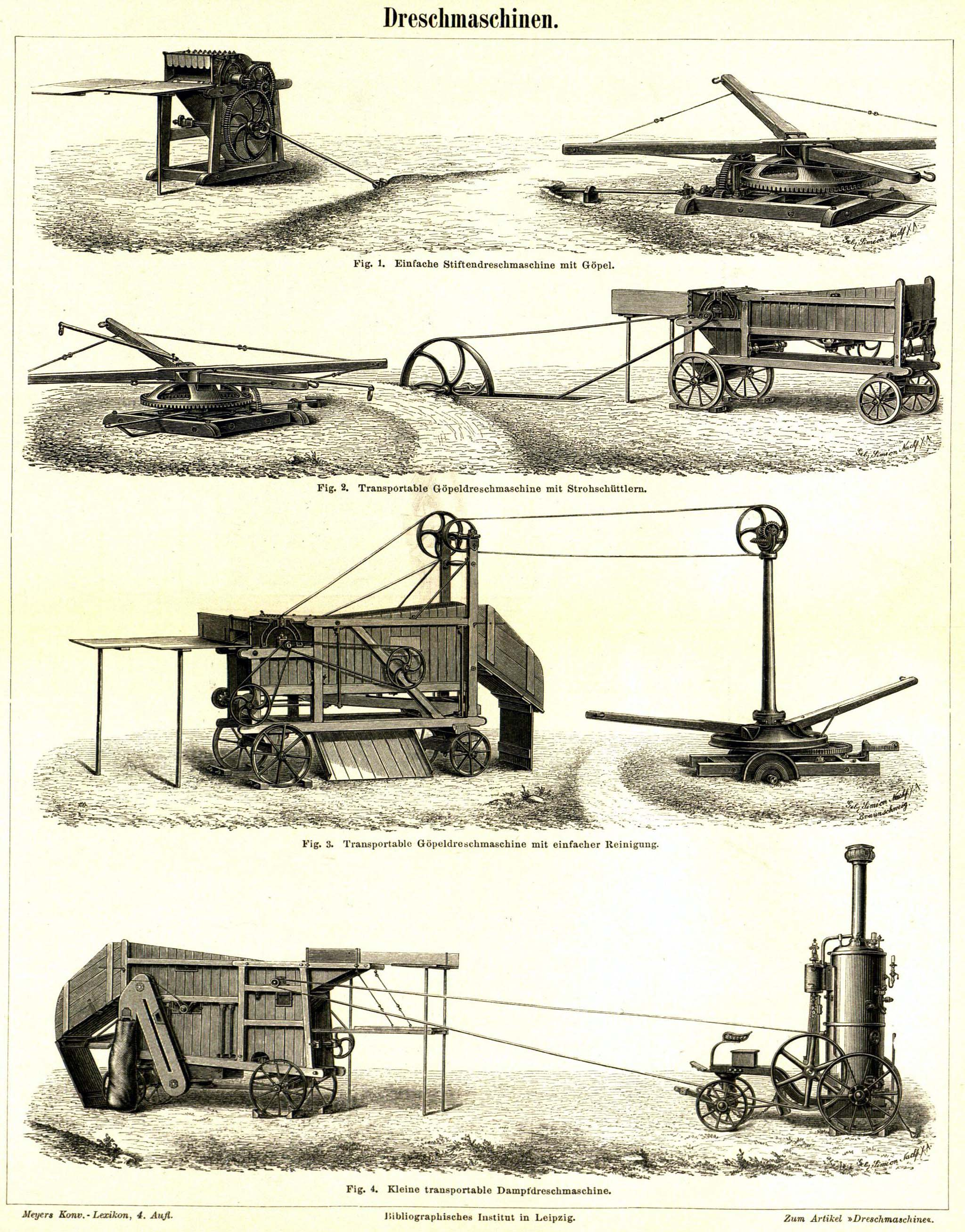 Fig. 1. Einfache Stiftendreschmaschine mit Göpel. Fig. 2. Transportable Göpeldreschmaschine mit Strohschüttlern. Fig. 3. Transportable Göpeldreschmaschine mit einfacher Reinigung. Fig. 4. Kleine transportable Dampfdreschmaschine